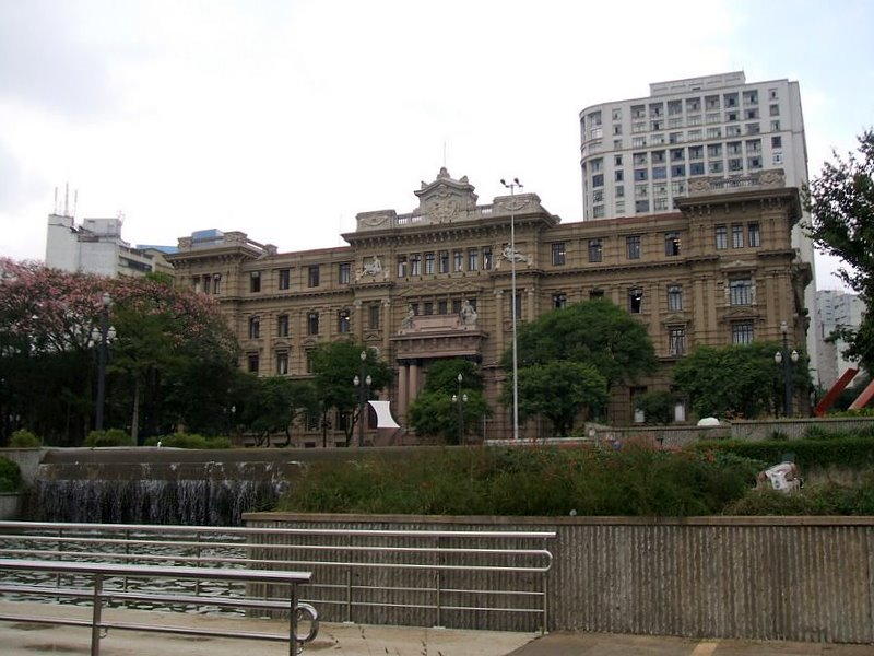 Palácio da Justiça de São Paulo, visto da Praça da Sé. São Paulo, Brasil.